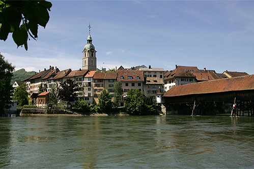 Altstadt von Olten (an der Aare)